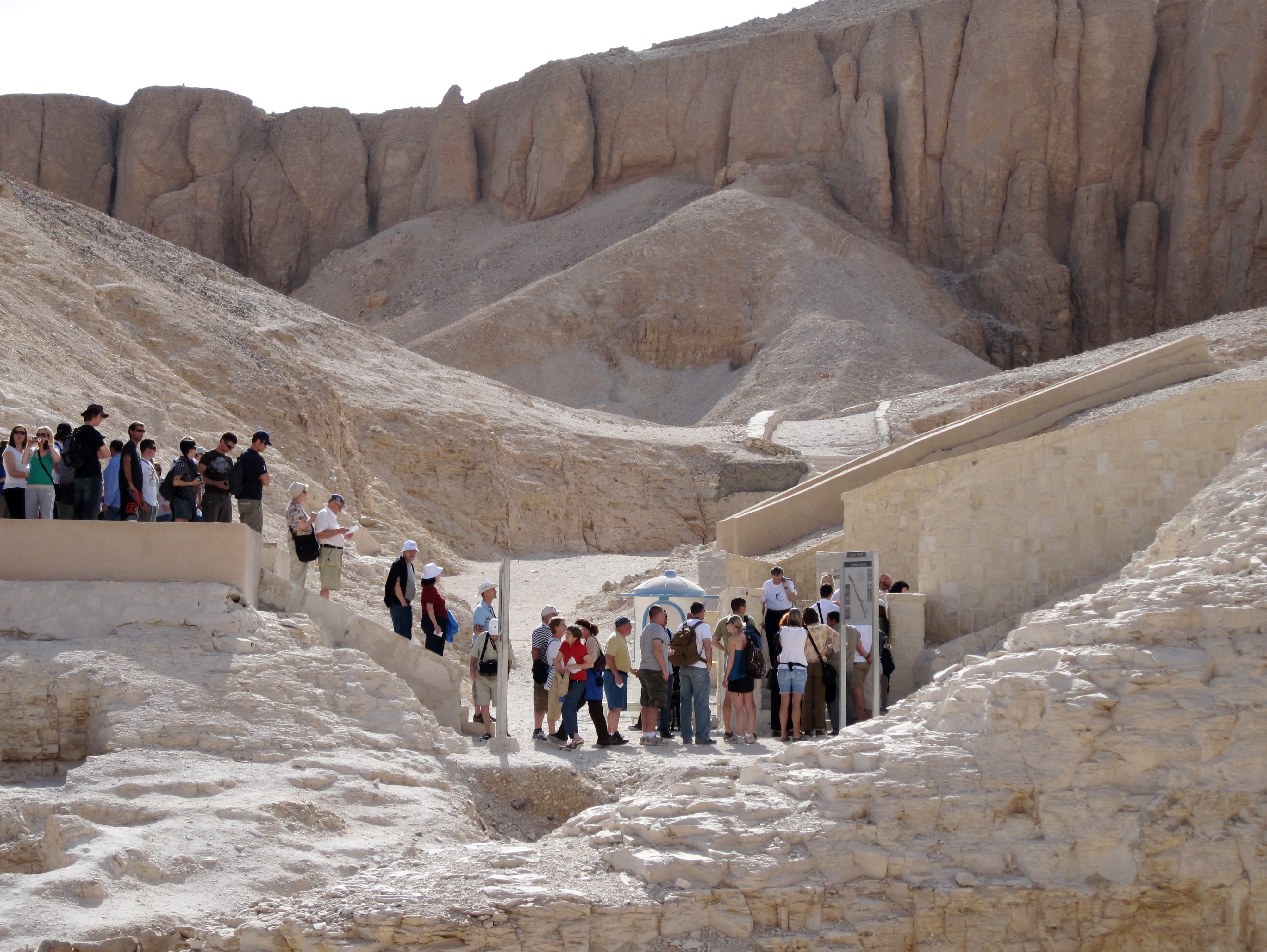 „Tal der Könige“, Theben-West (Luxor), Ägypten